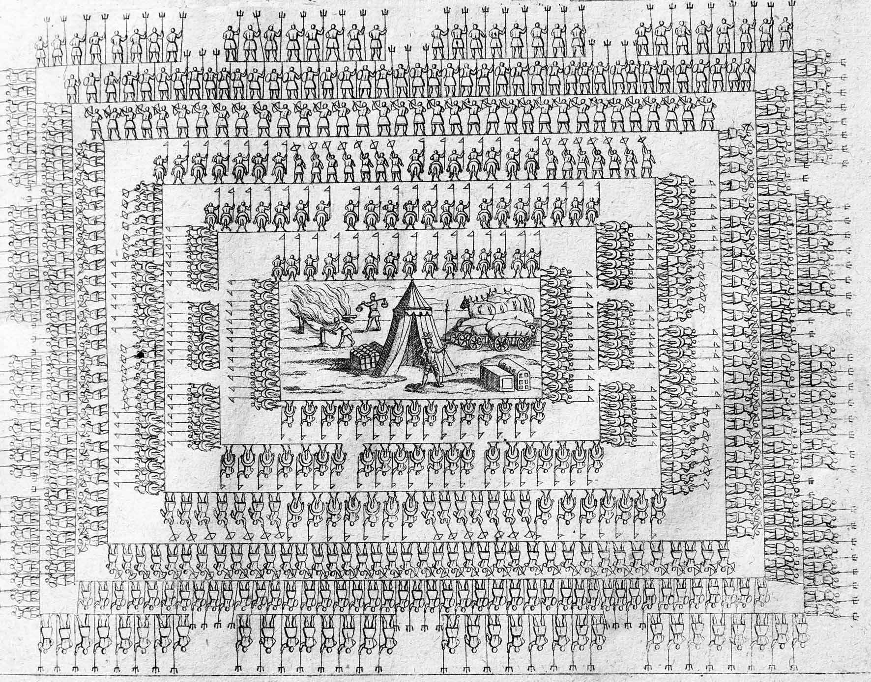 Heeresformation mit vierfacher Front. Abb. in: Montfaucon, Bernard de; Schatz, Johann Jakob [Hrsg.]: Griechische und Römische Alterthümer / welche der berühmte P. Montfaucon ehemals samt den dazu gehörigen Supplementen in zehen Bänden in Folio, an das Licht gestellet hat ... Auszugsweise ... in Deutscher Sprache herausgegeben von M. Johann Jacob Schatzen …, Nürnberg, in Verlag Georg Lichtenstegers, Kupferstechers. Gedruckt mit Fleischmannischen Schriften 1757; Zweyter Band, Tafel CXV (115). Ursprünglich Abb. in: Claudius Aelianus: Opera, quae extant, omnia. Zürich, Gesner 1556!